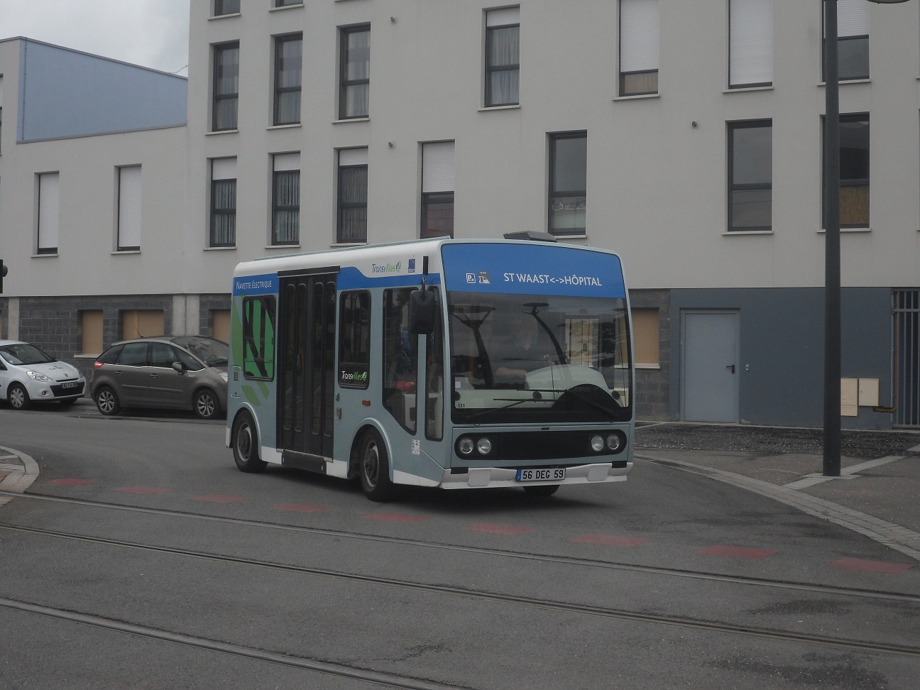 Gepebus Oreos 22 n°501 sortant du dépôt de Saint-Waast, sur le réseau Transvilles de Valenciennes.